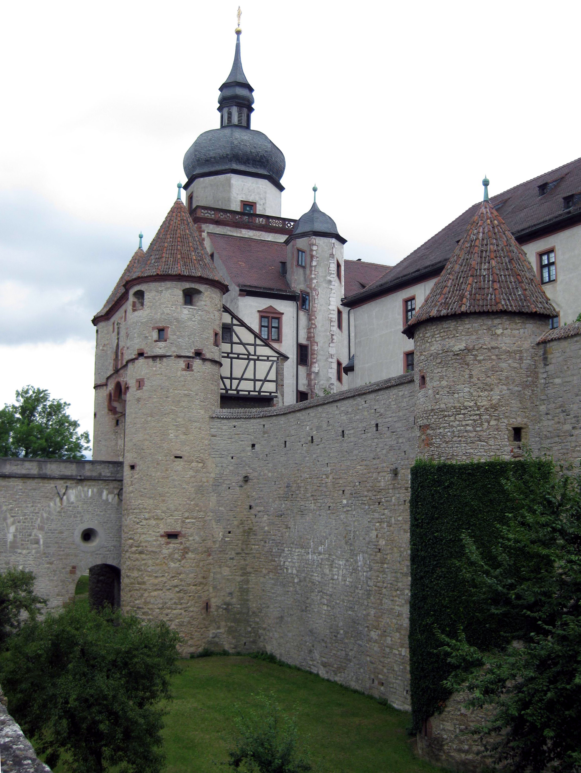 Festung Marienberg, Würzburgs